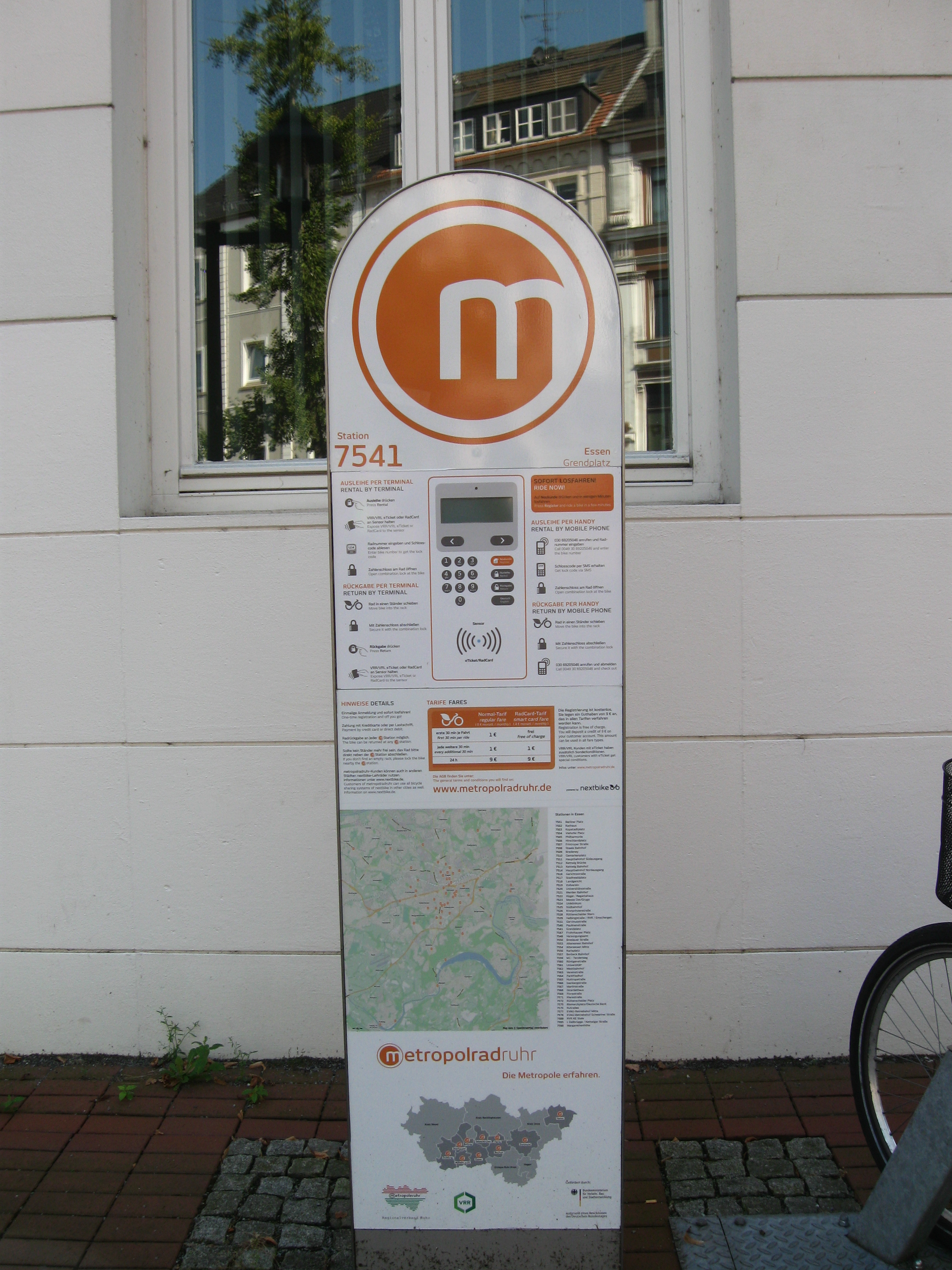 Informationsstele in Steele (öffentliche Fahrradverleihstation vor dem Amtsgericht/Alte Post)